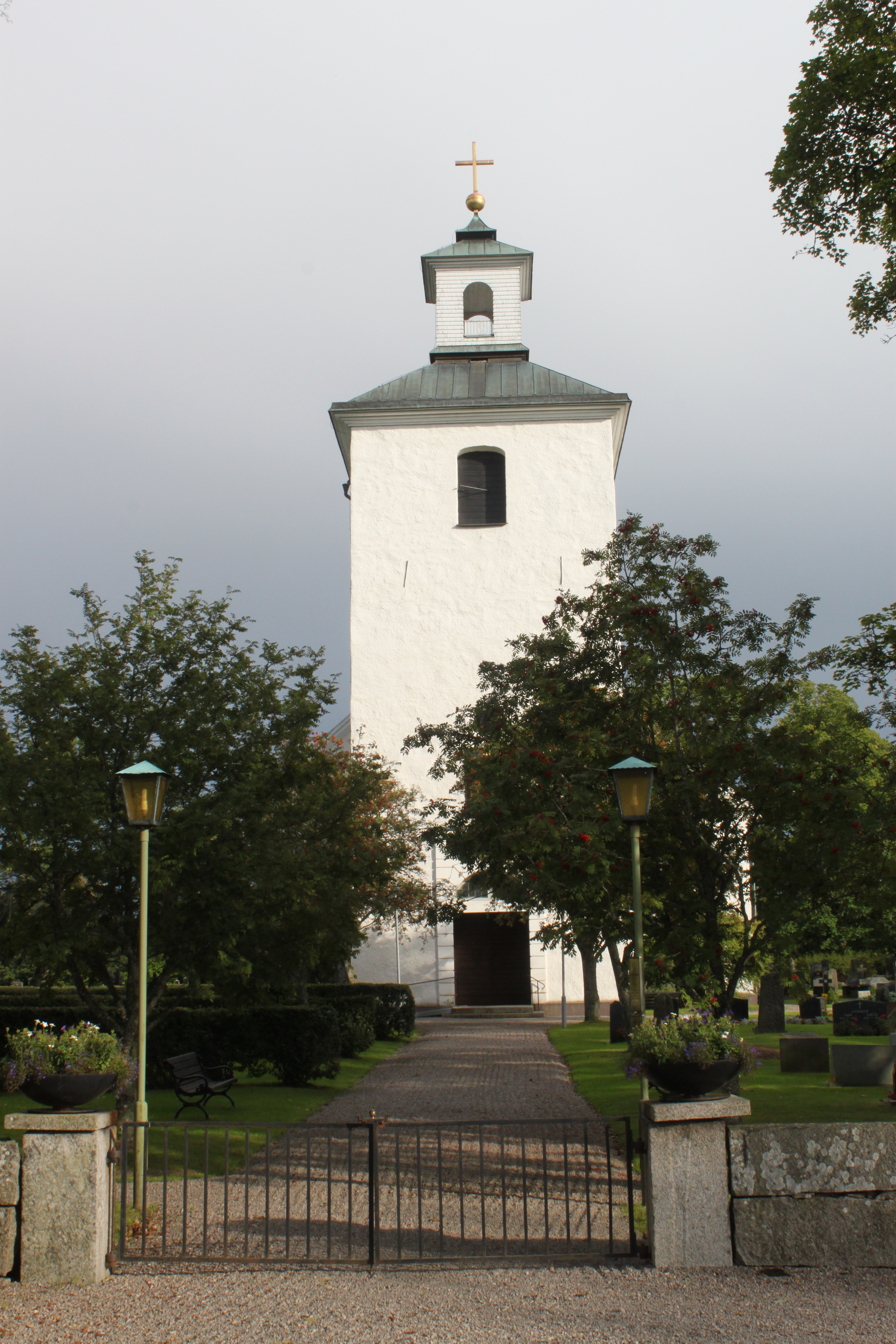 Skatelövs kyrka